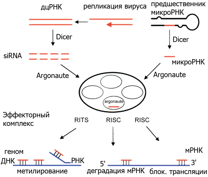 == RNAi simplified